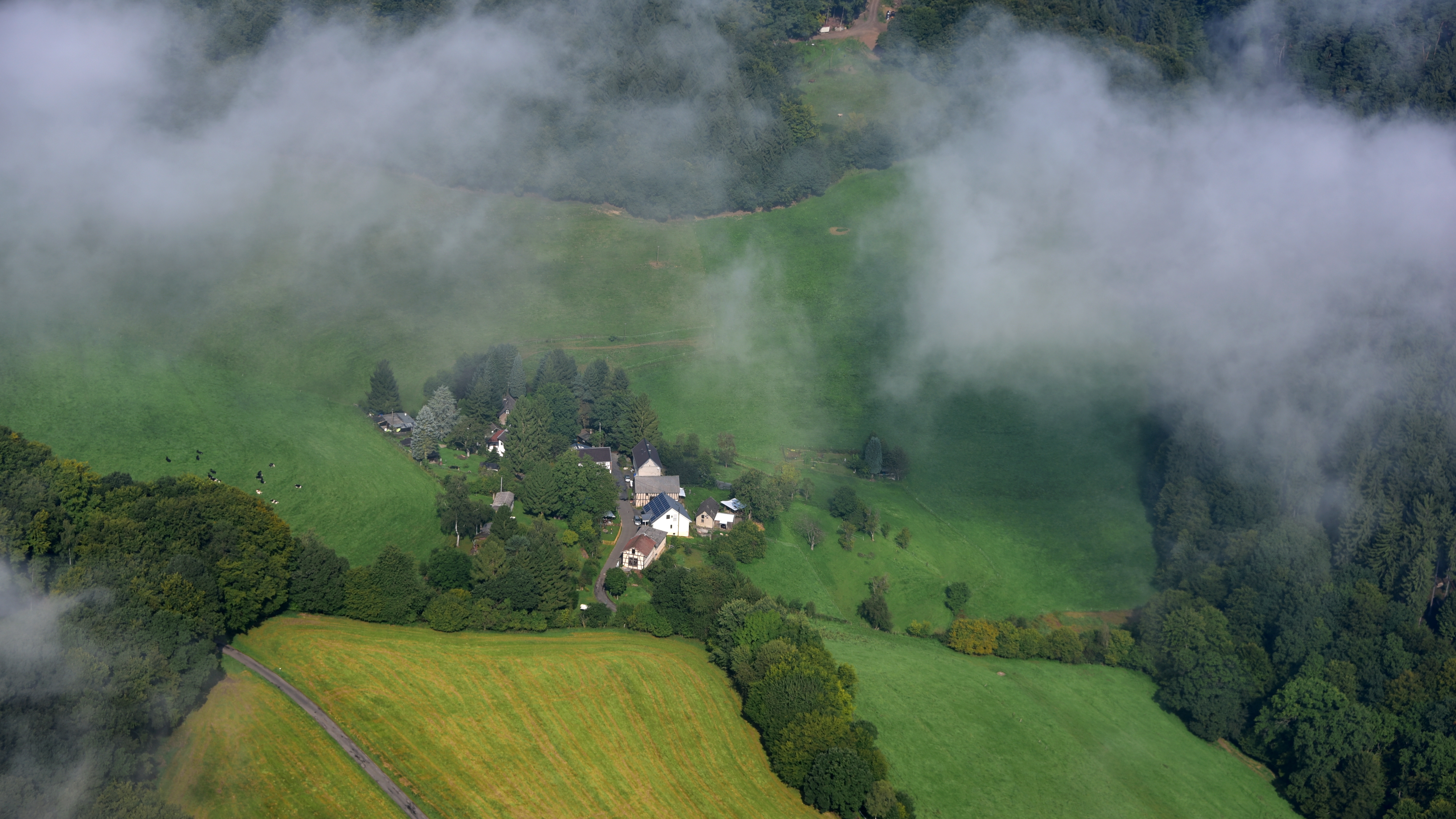 Leubsdorf, Ortsteil Krumscheid, Luftaufnahme (2017)